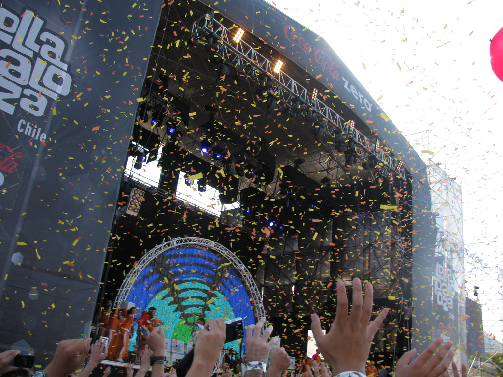 @Lollapalooza